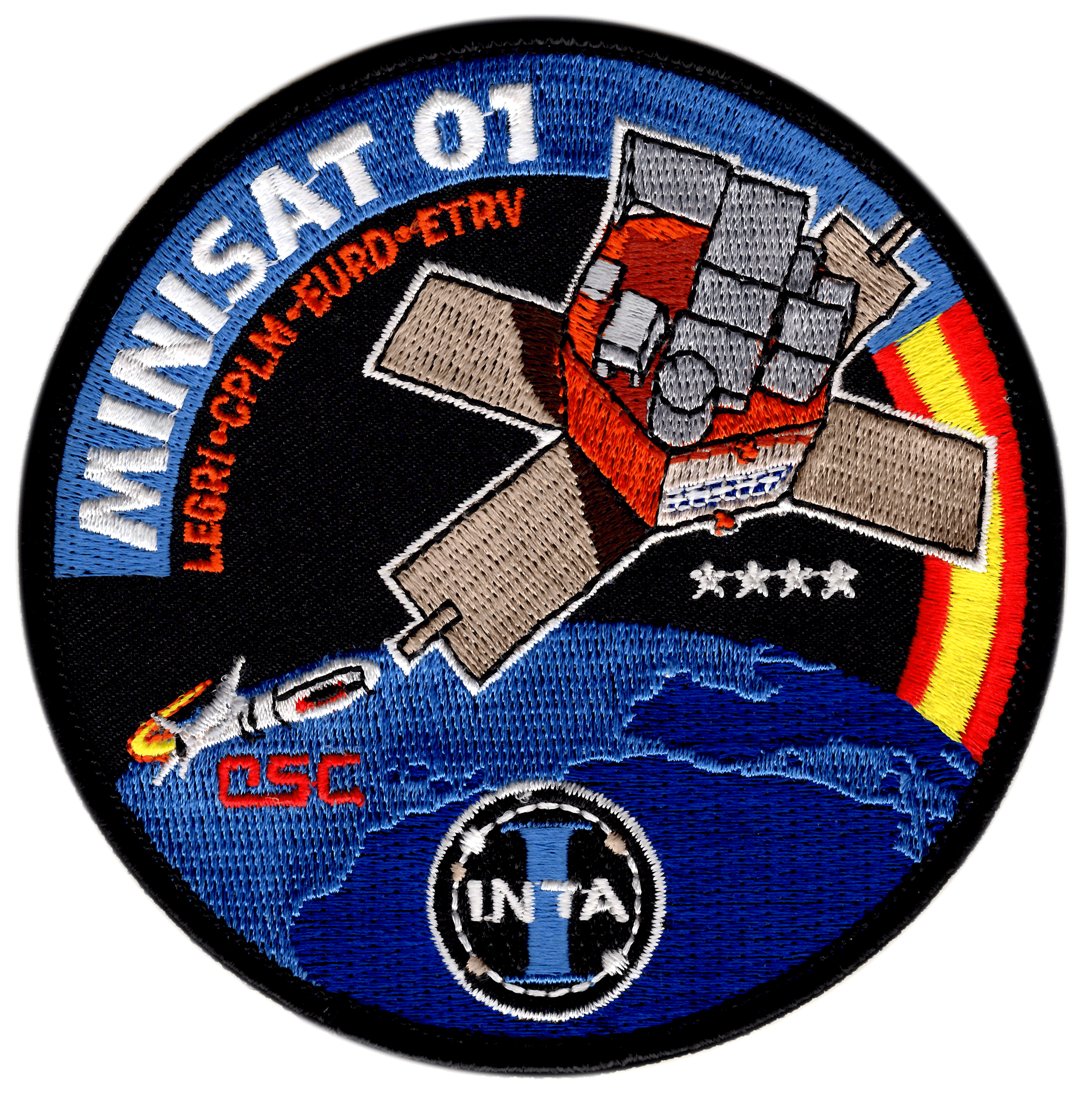 Parche de la misión Minisat 01 del INTA